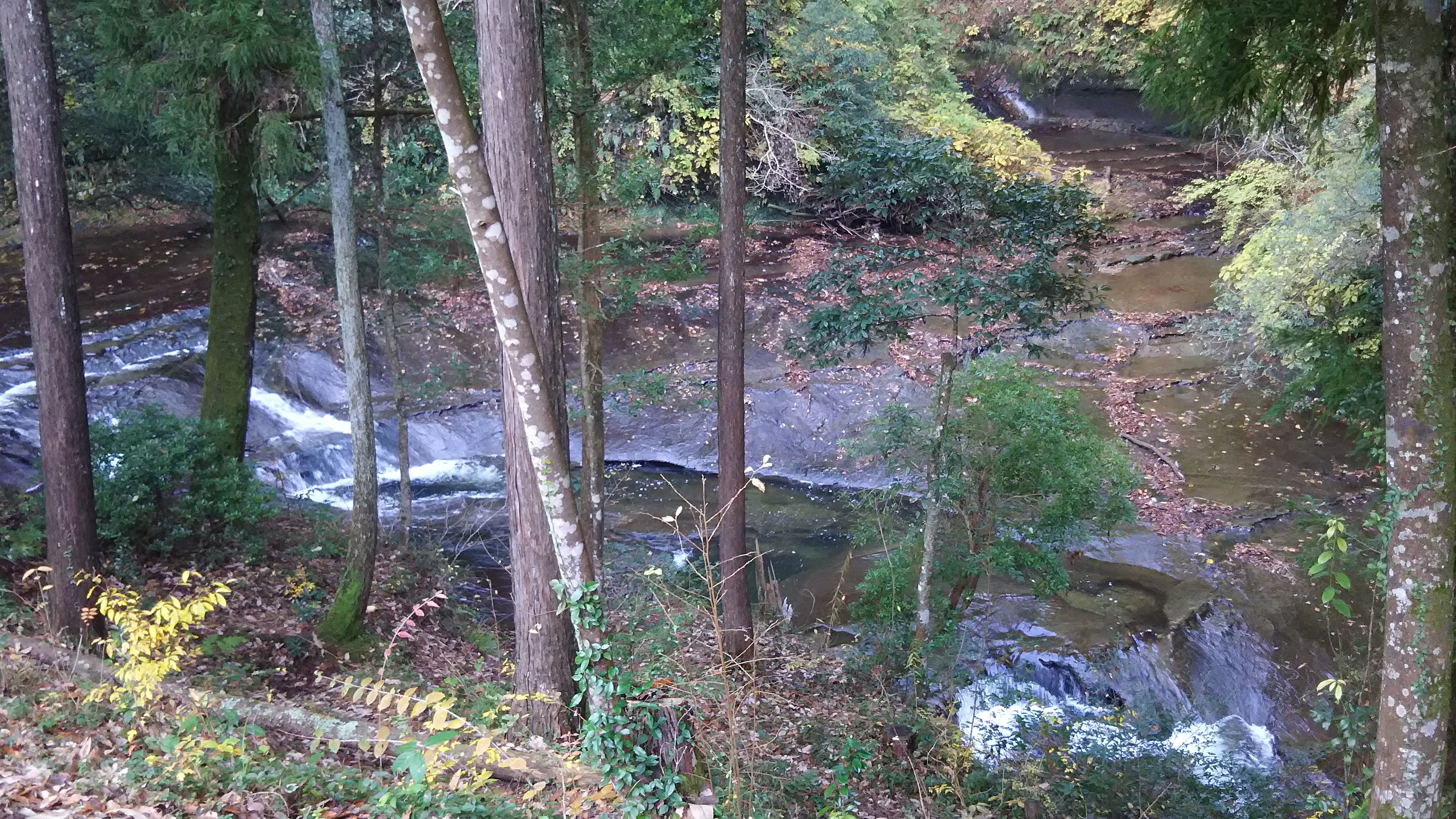 千葉県君津市の農溝の滝（亀岩の洞窟の下流側にある旧来の「農溝の滝」）